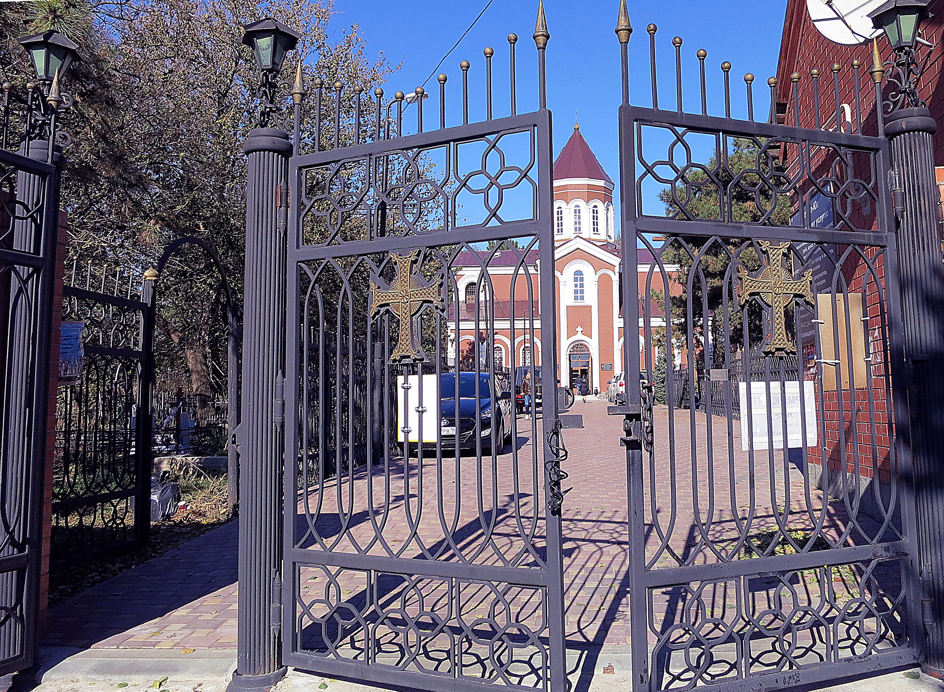 Ограда с воротами (Ростовская область, Ростов-на-Дону, терр. армянского кладбища)